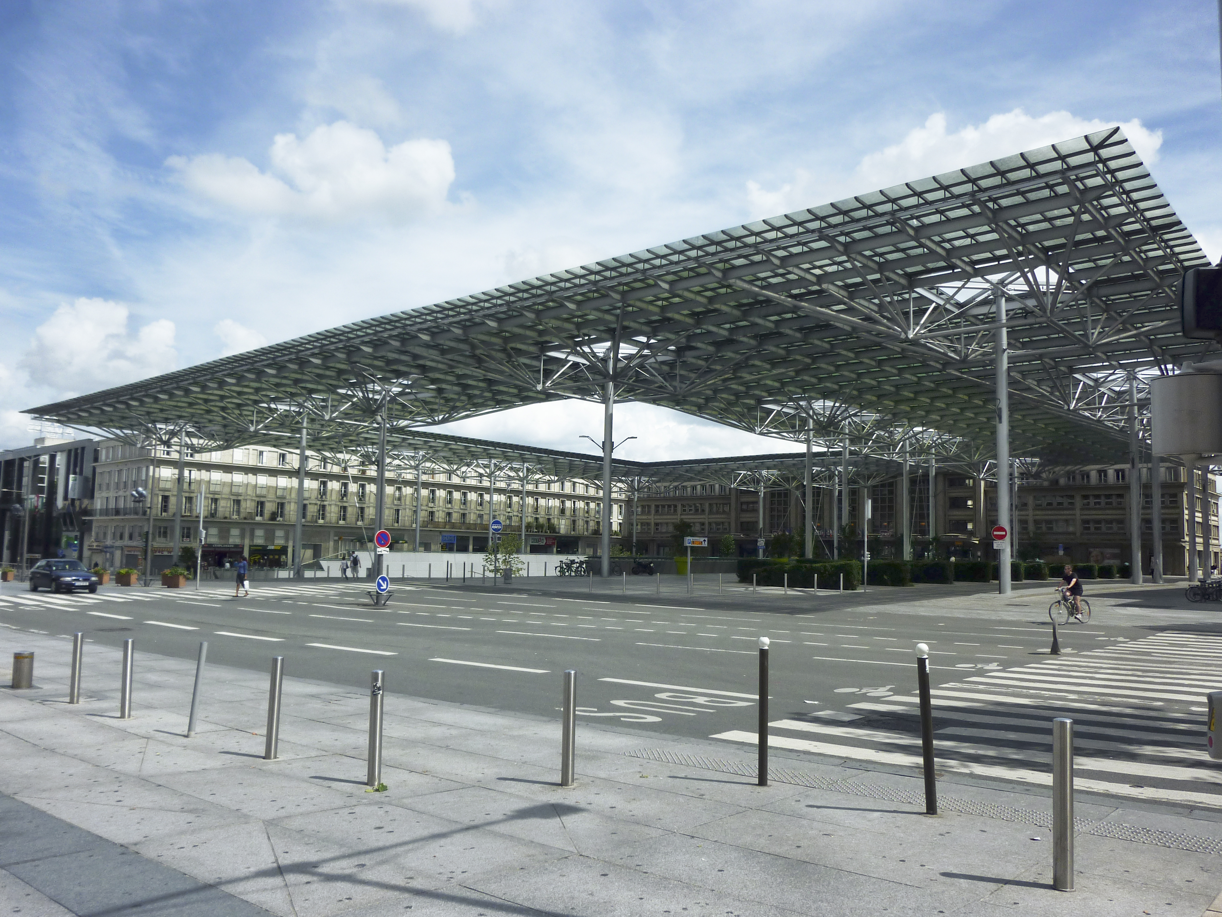 Gare d'Amiens, verrière Vasconi de place Alphonse Fiquet, août 2012